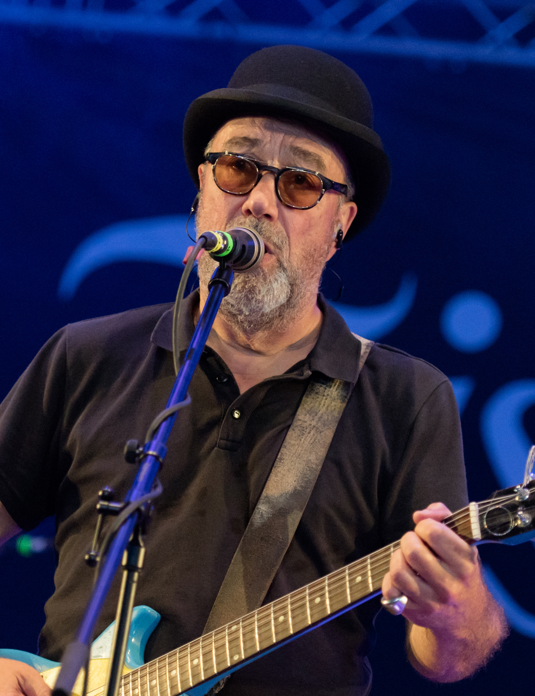 Fischer-Z beim Wacken Open Air 2018